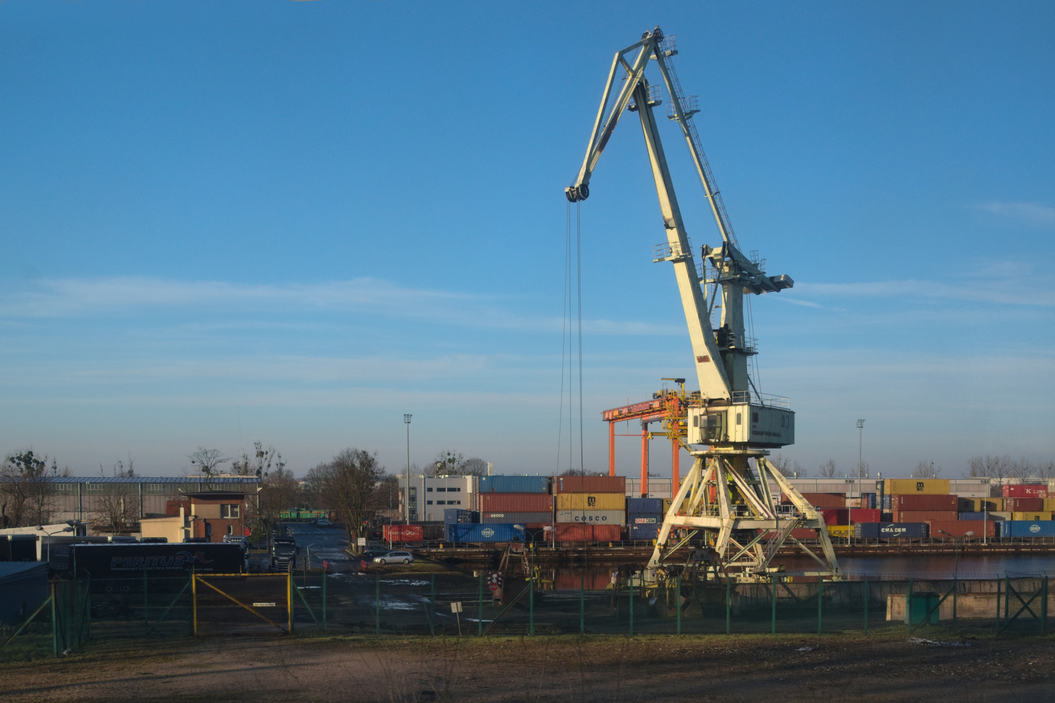 dźwig w porcie Gliwice, produkcji Kranbau Eberswalde, widok z okna pociągu